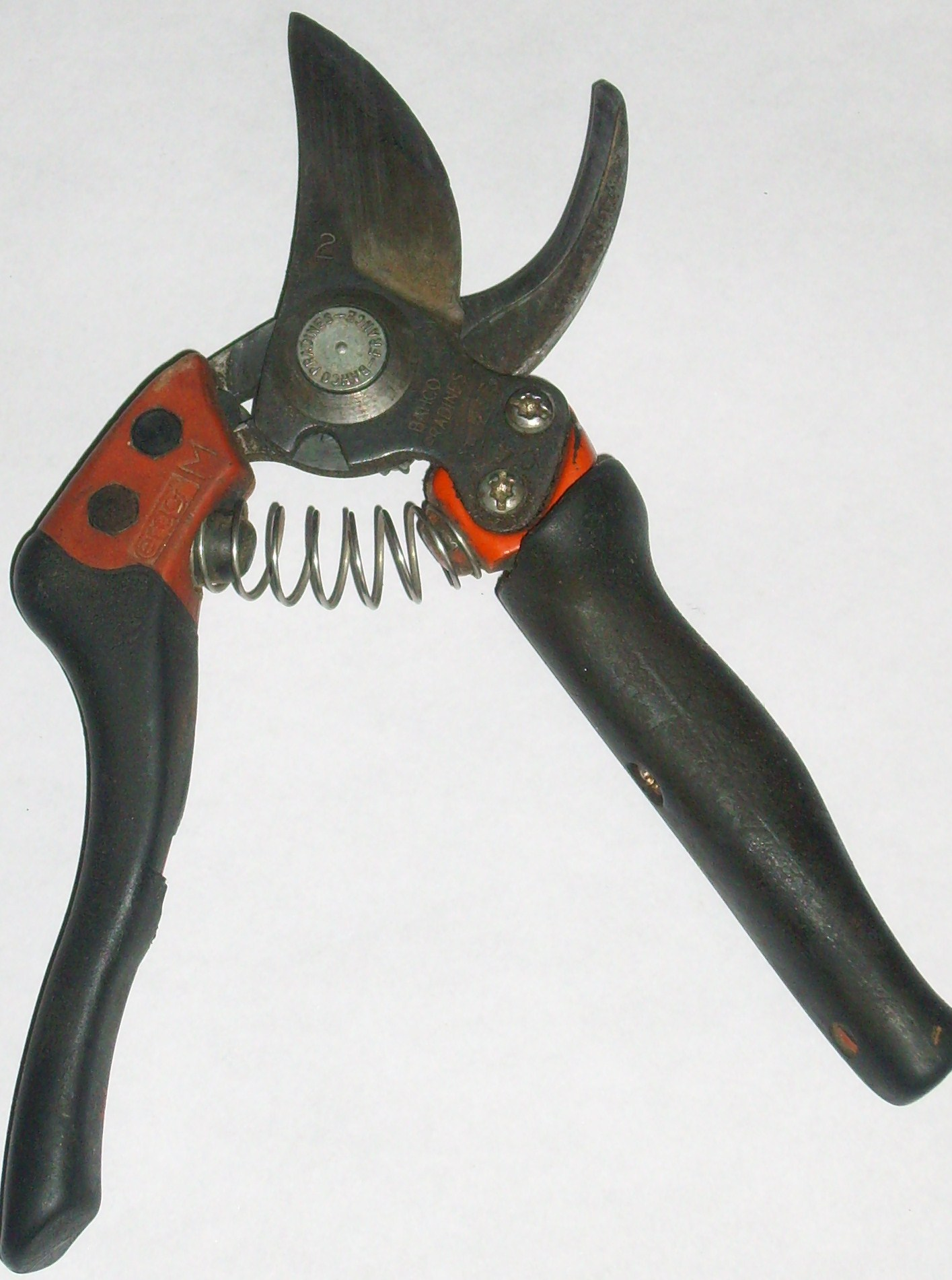 Sécateur manuel a manche tournante pour la taille de pied de vigne